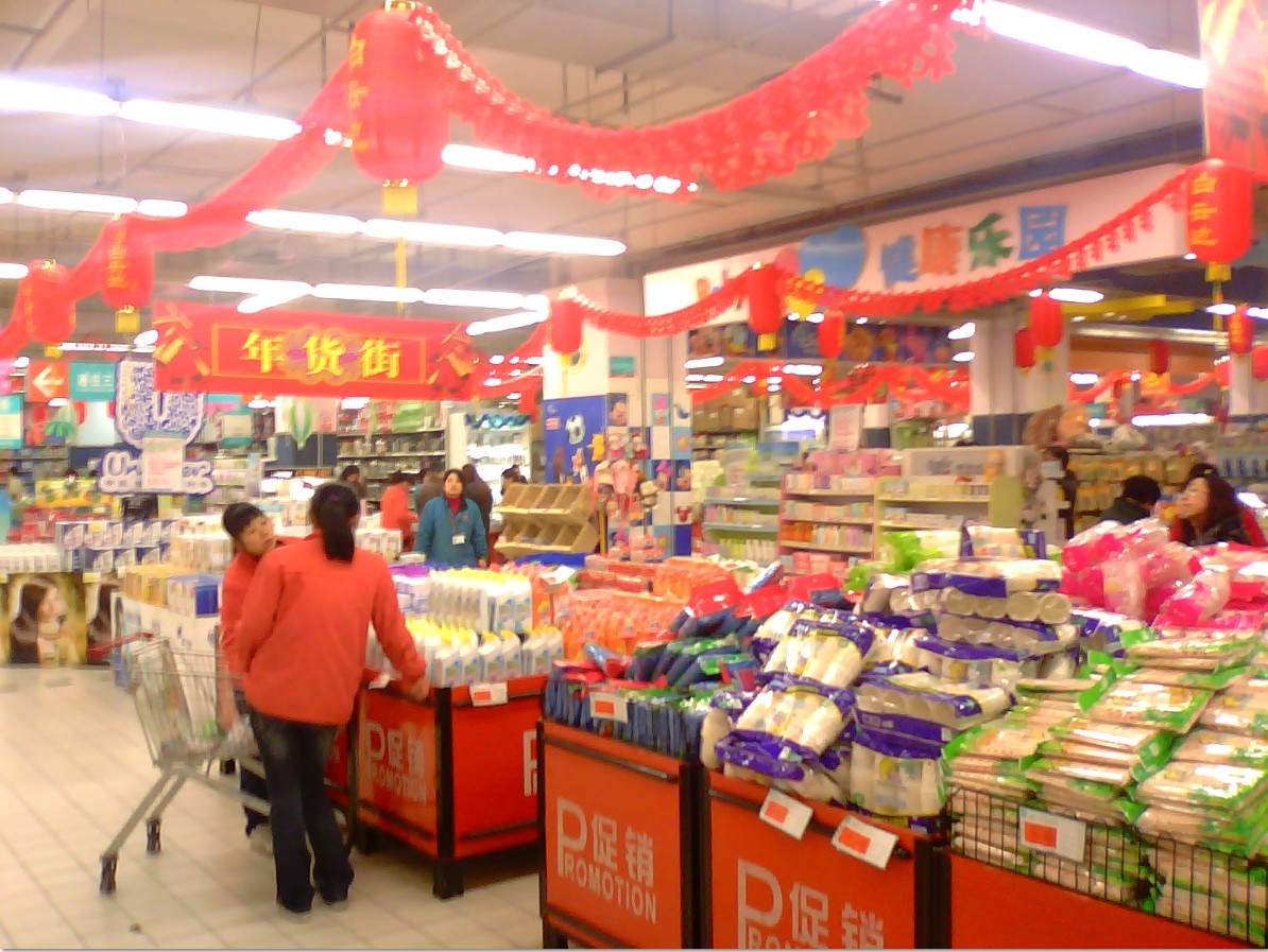 中文（中国大陆）: 中国湖北省宜昌市的一家超级市场